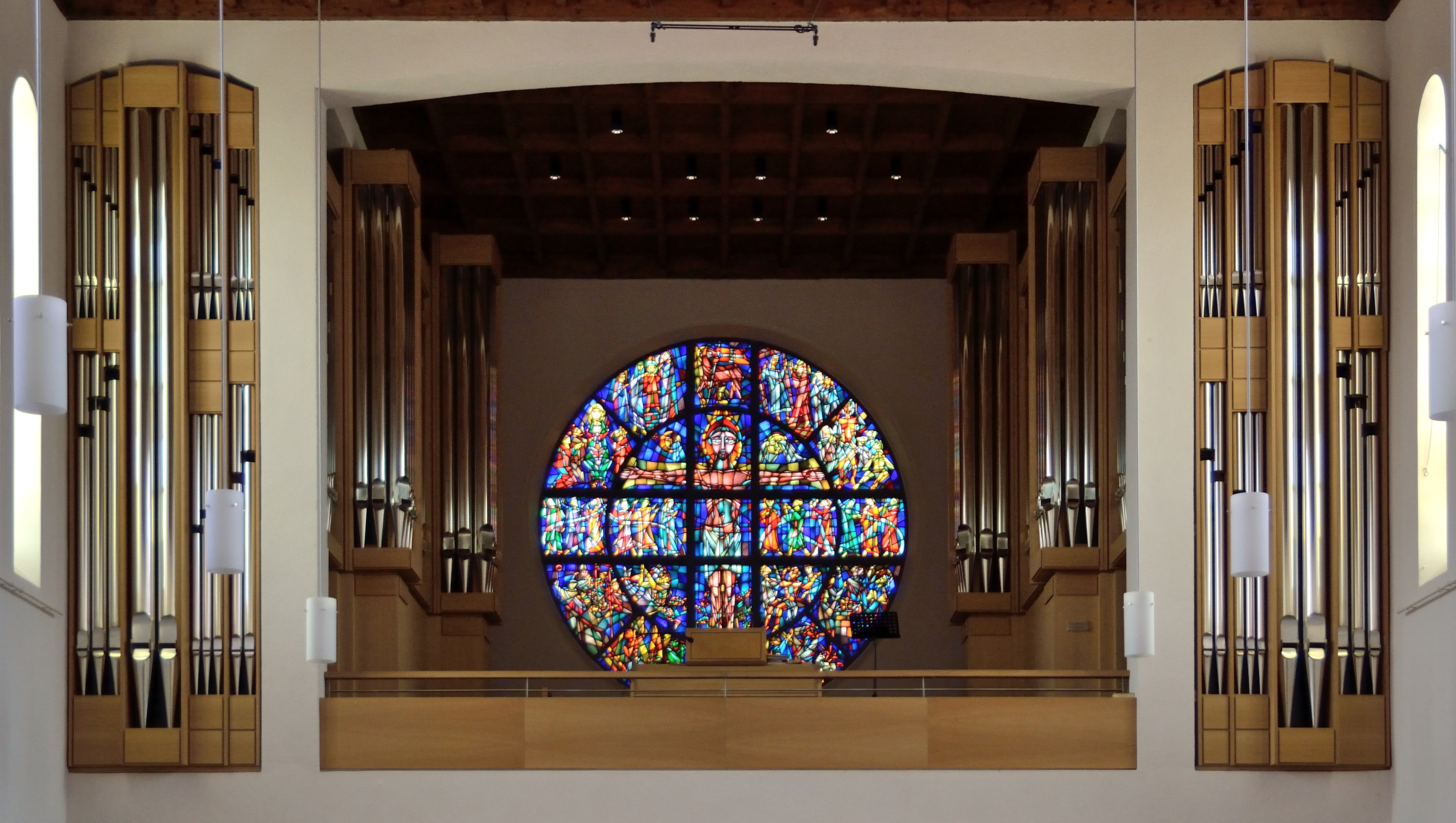 Schuke-Orgel in der Detmolder Heilig Kreuz-Kirche